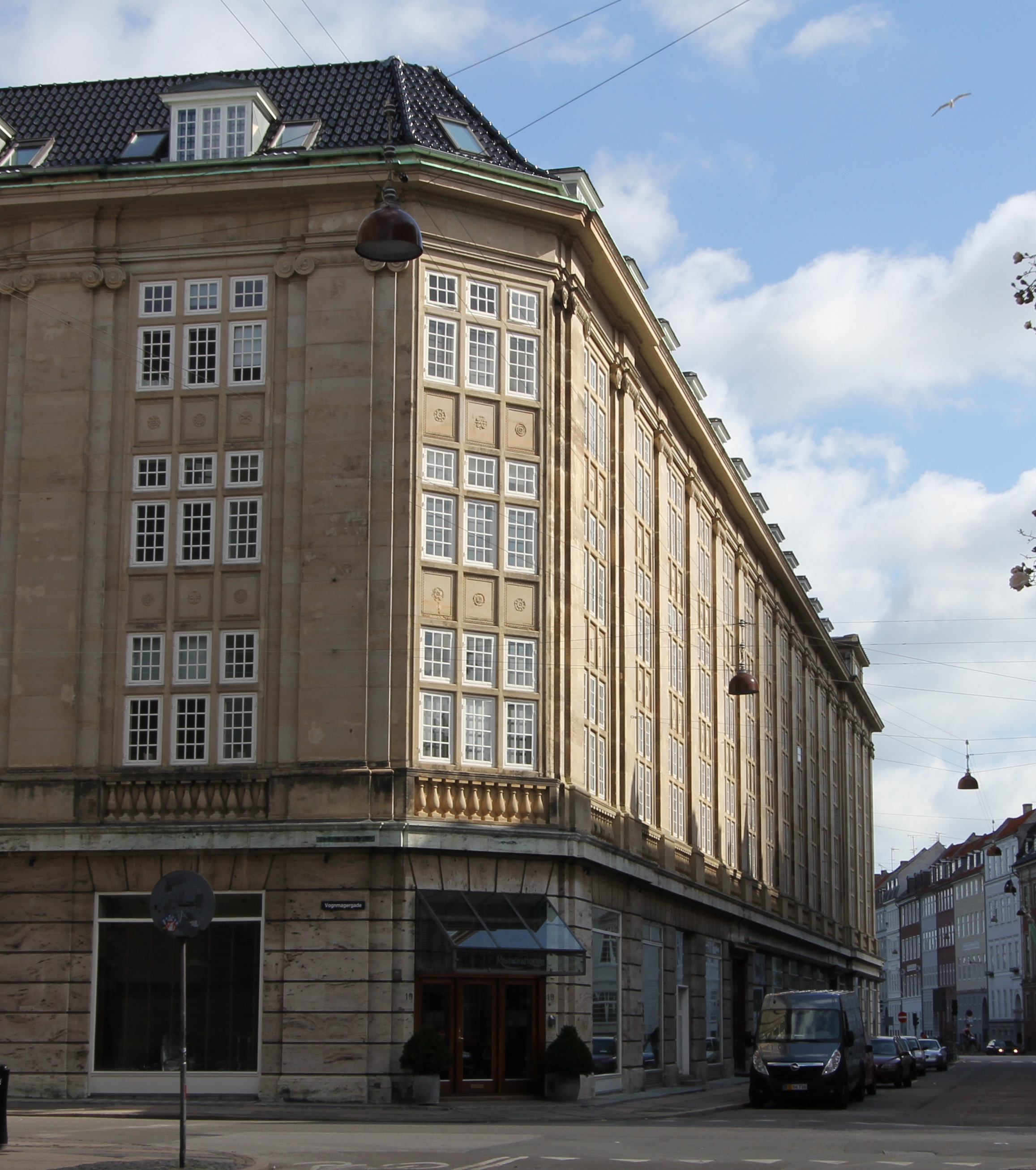 Restaurant Restaurationen in Møntergade in Copenhagen, Denmark